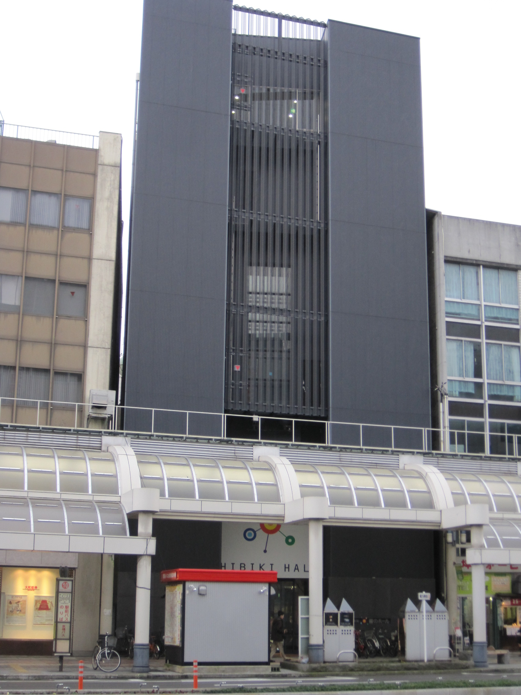 福井まちなか文化施設 響のホール（福井県福井市）